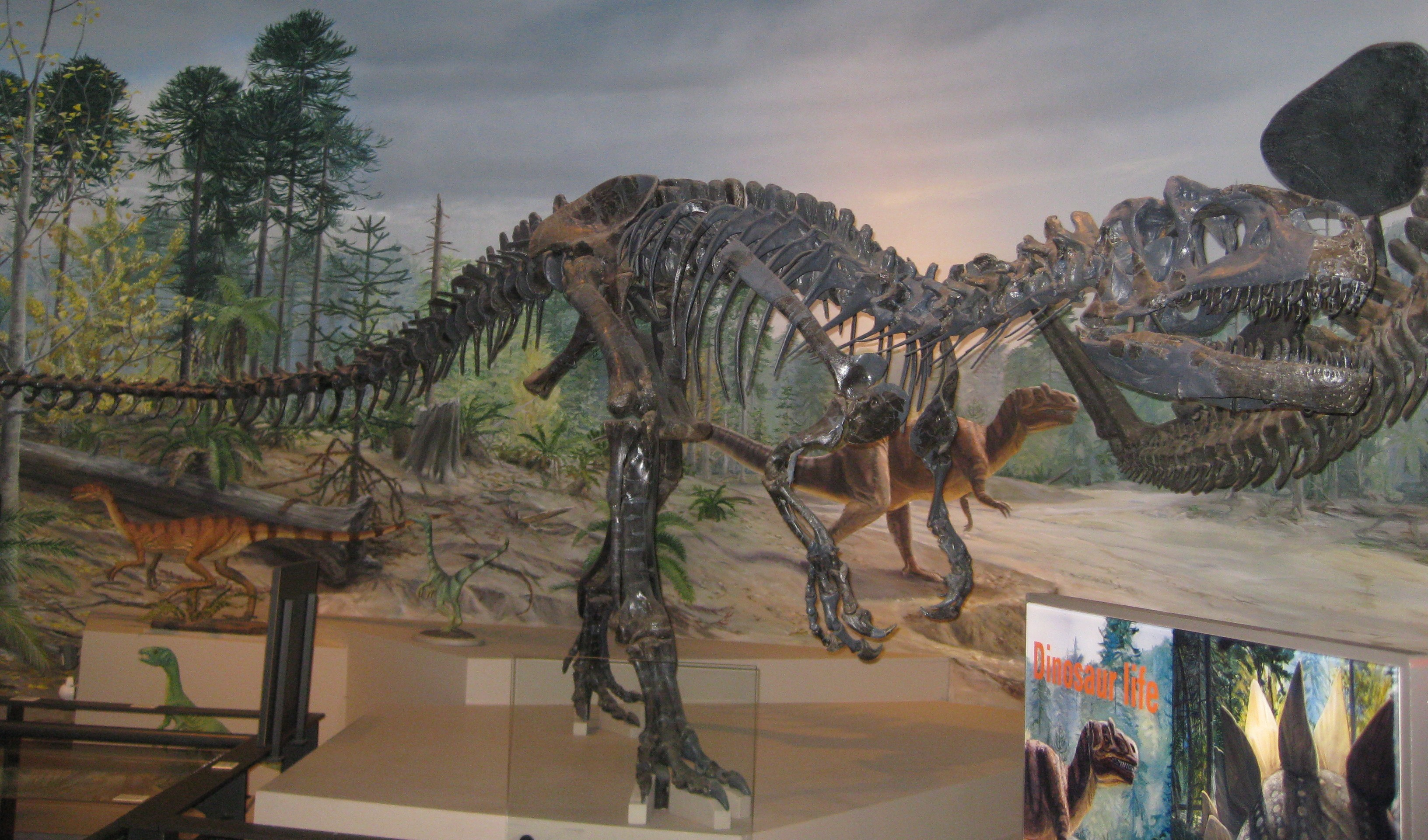 Dinosaur Skeleton